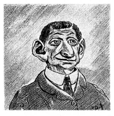 Karikatuur van een Joodse man. Afkomstig uit Theo van Doesburg ([1910]) De maskers af!, Amsterdam: Vennootschap Letteren en Kunst, plaat V.